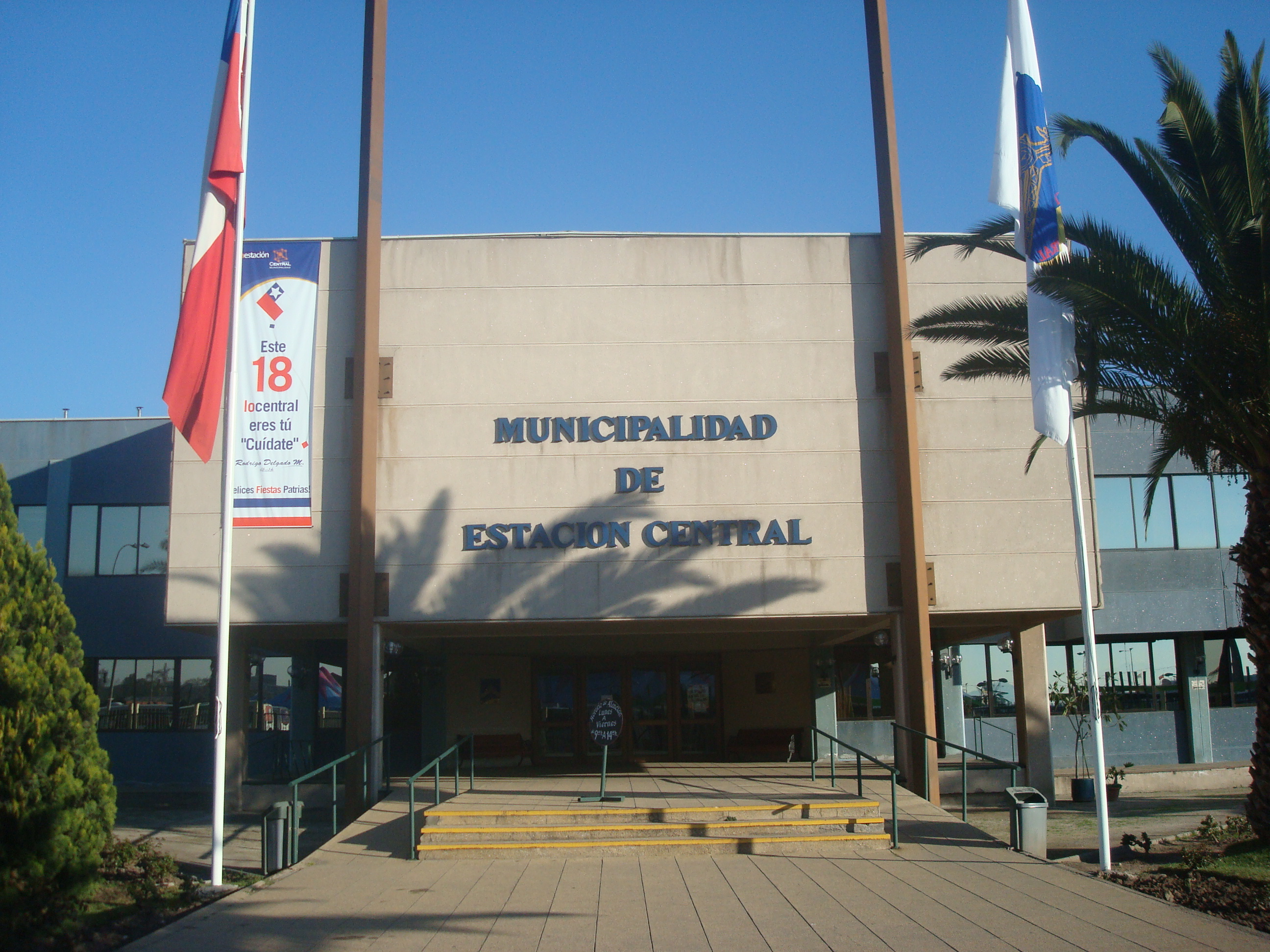 Edificio consistorial de la Ilustre Municipalidad de Estación Central, Santiago de Chile